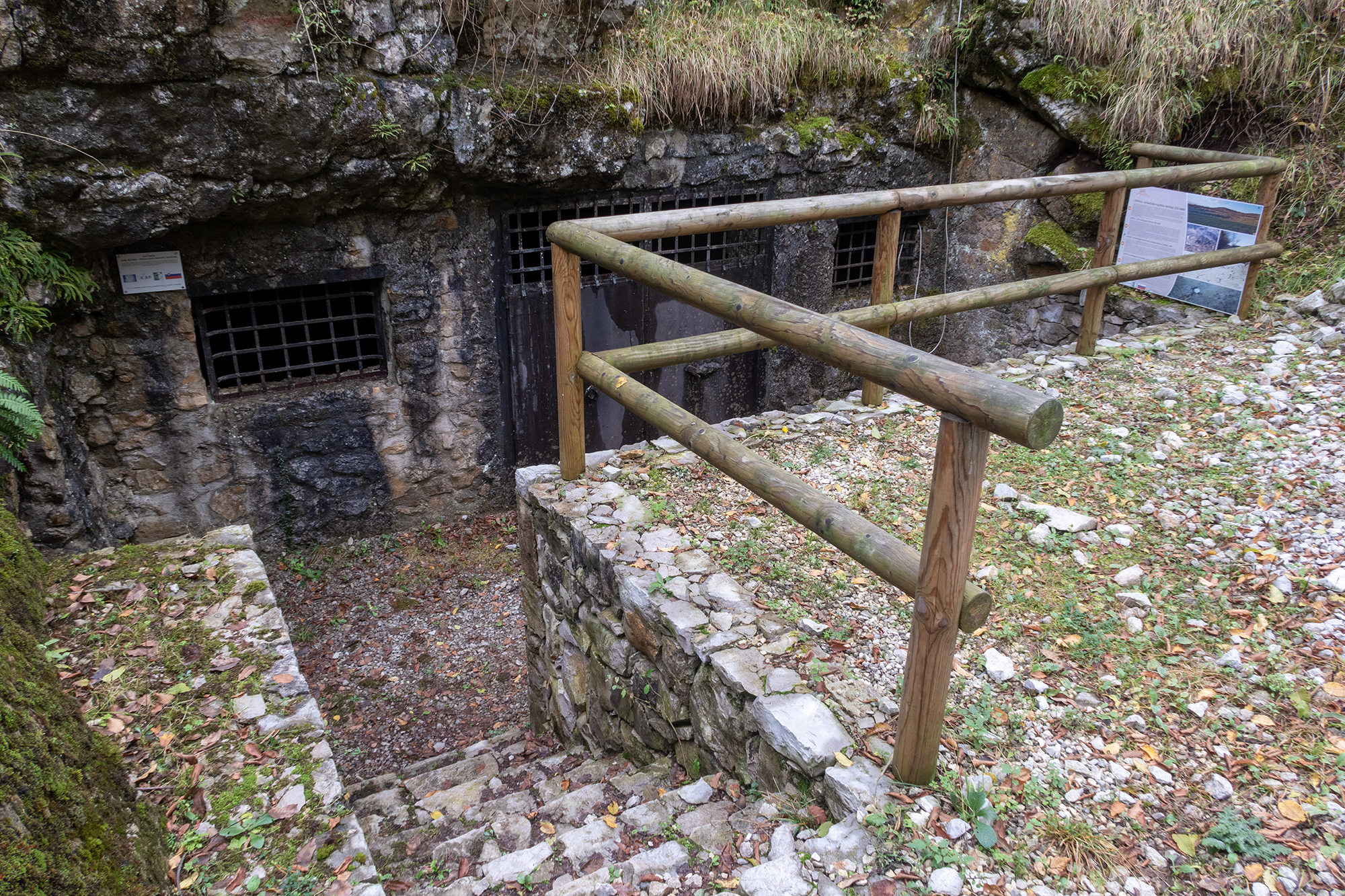 Vhod v jamo Pečinko